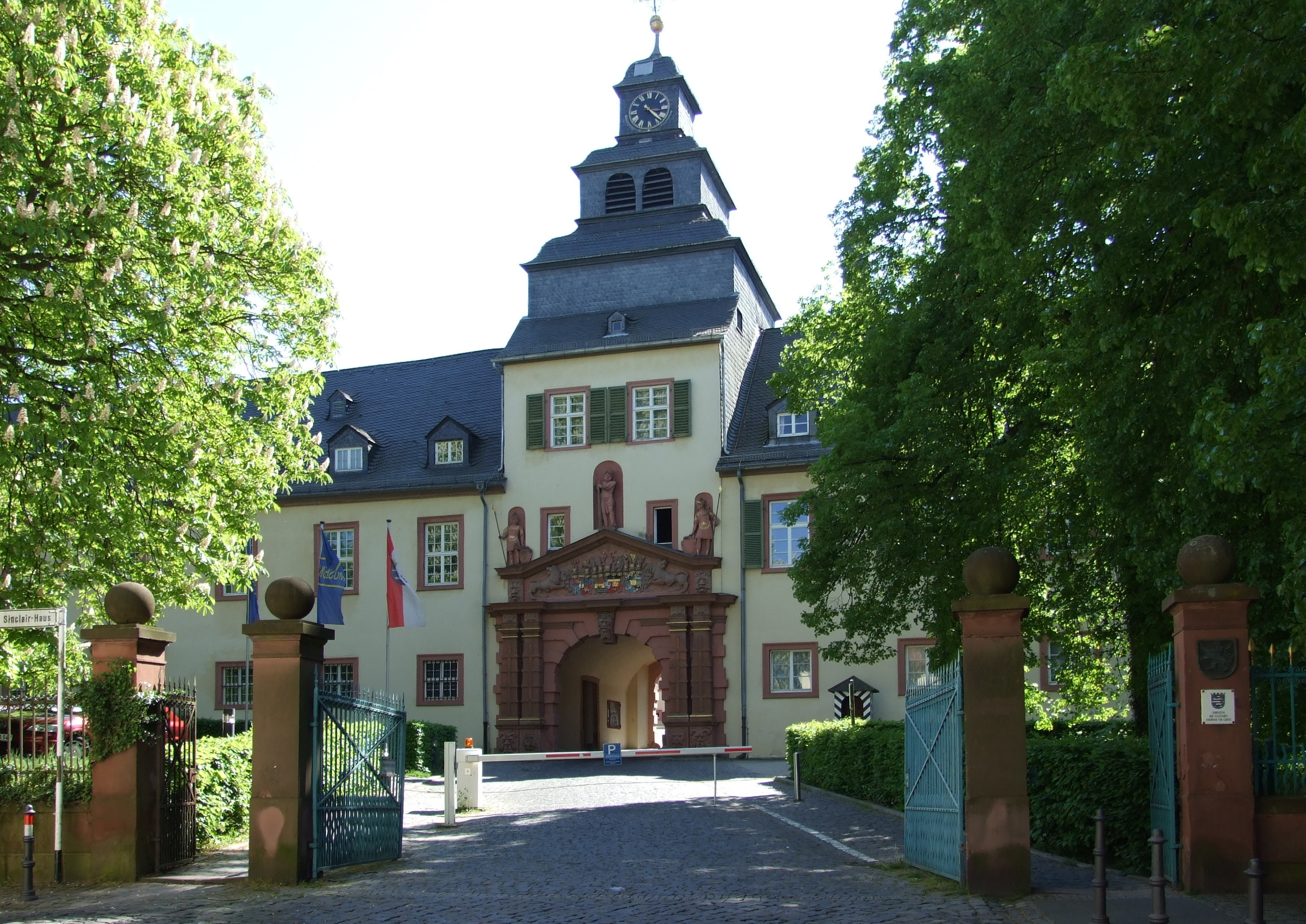 Schloss in Bad Homburg, Haupteingang.